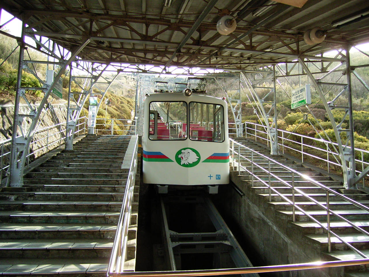 十国峠ケーブルカーの車両